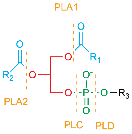 self-made in chemdraw.